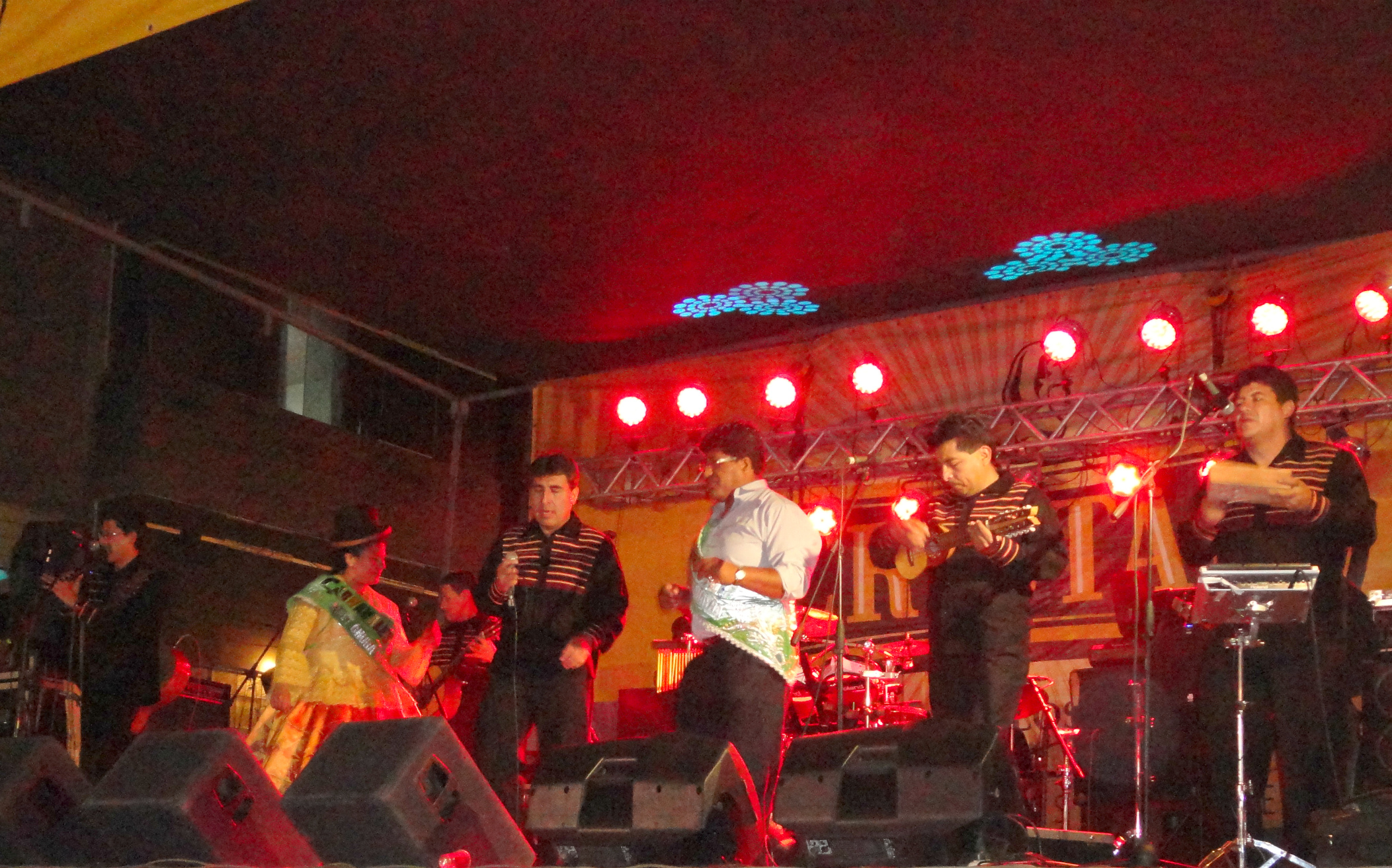 fiesta de carnavales 2012 centro comercial tupac amaru en tacna